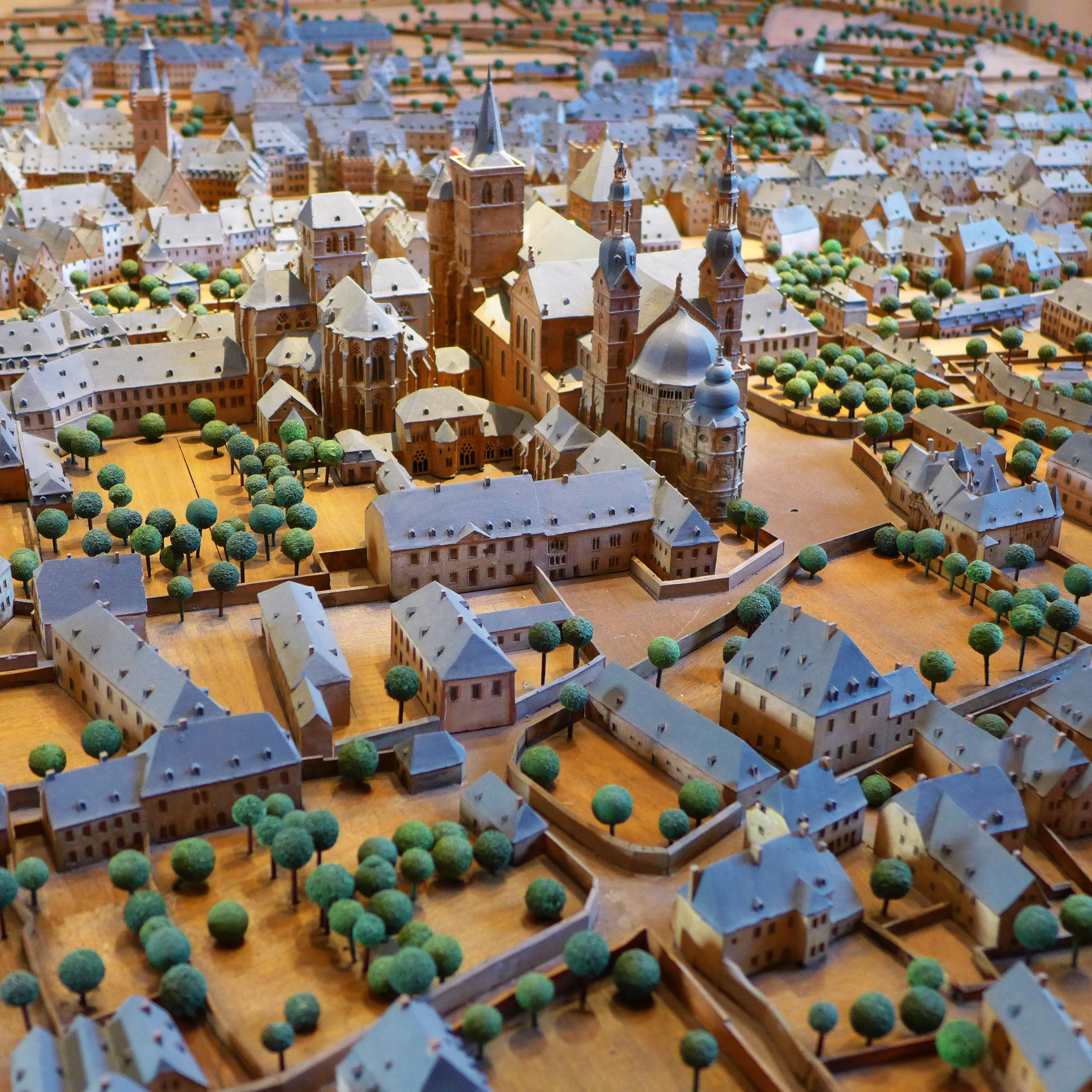 Der barocke Trierer Dom mit der Liebfrauenkirche um das Jahr 1800, Stadtmodell Trier, Albert Kiefer 1954 ff, Lindenholz, Stadtgeschichtliches Museum Simeonstift